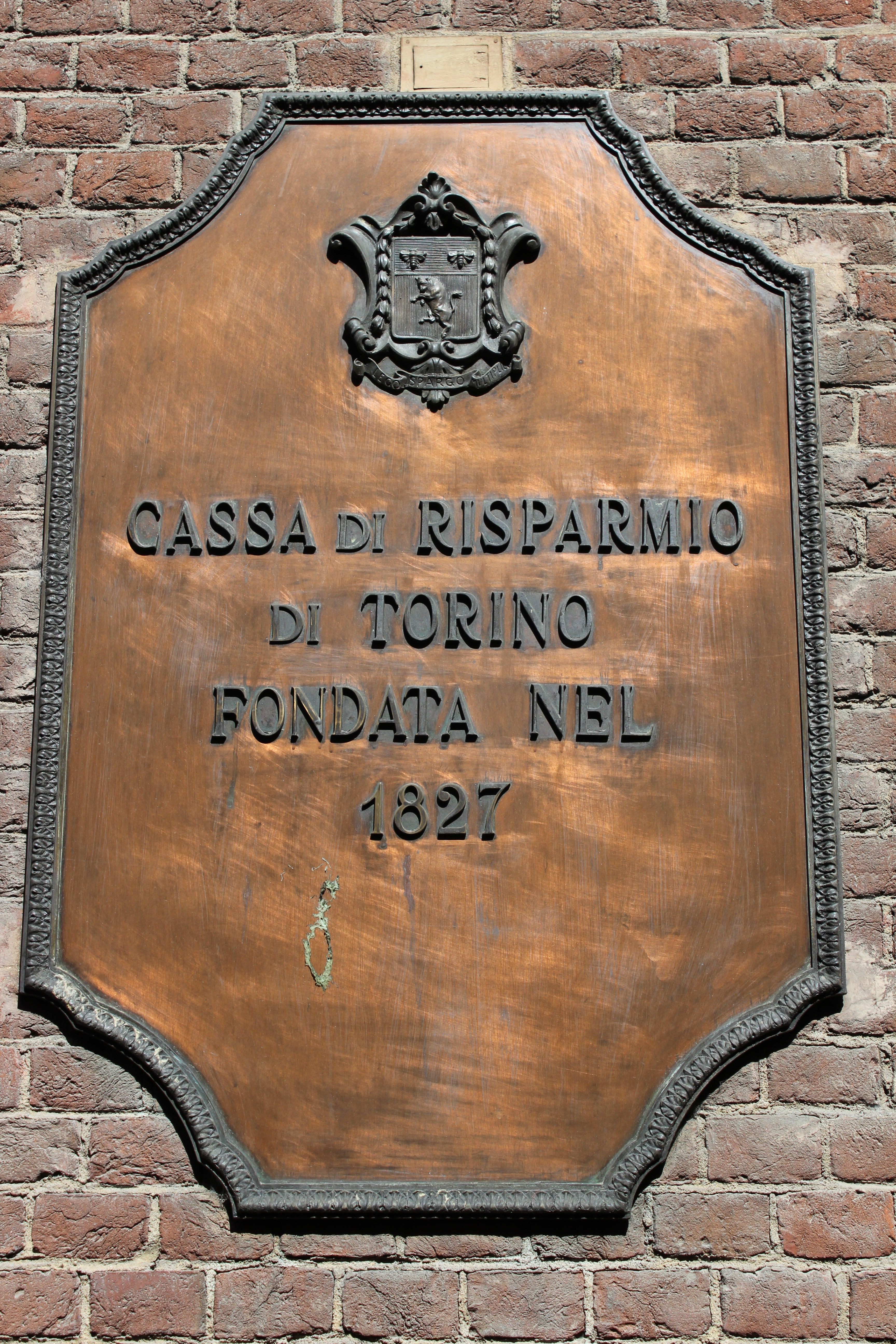 Chieri.